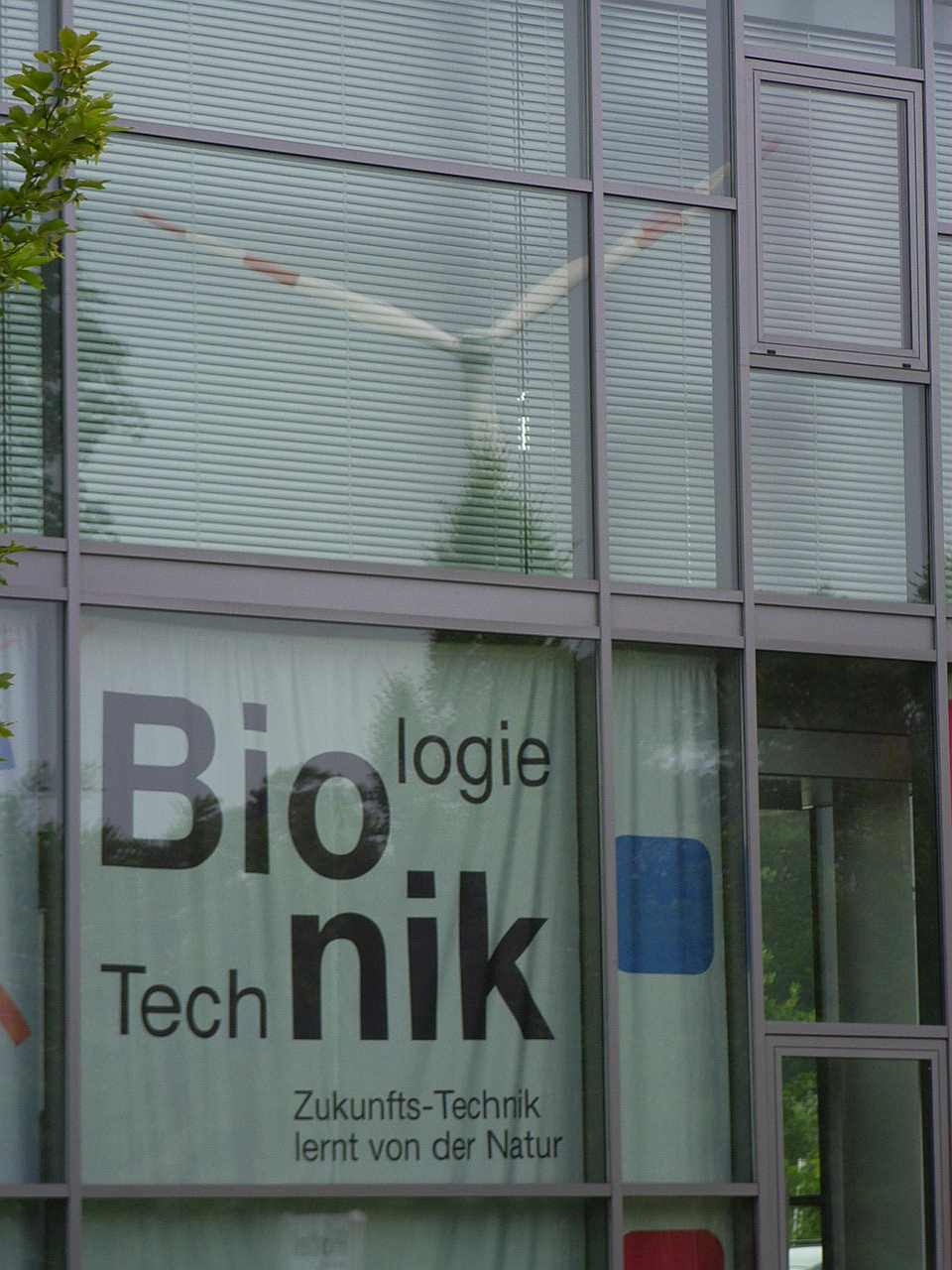 Bionikaustellung im Listzentrum